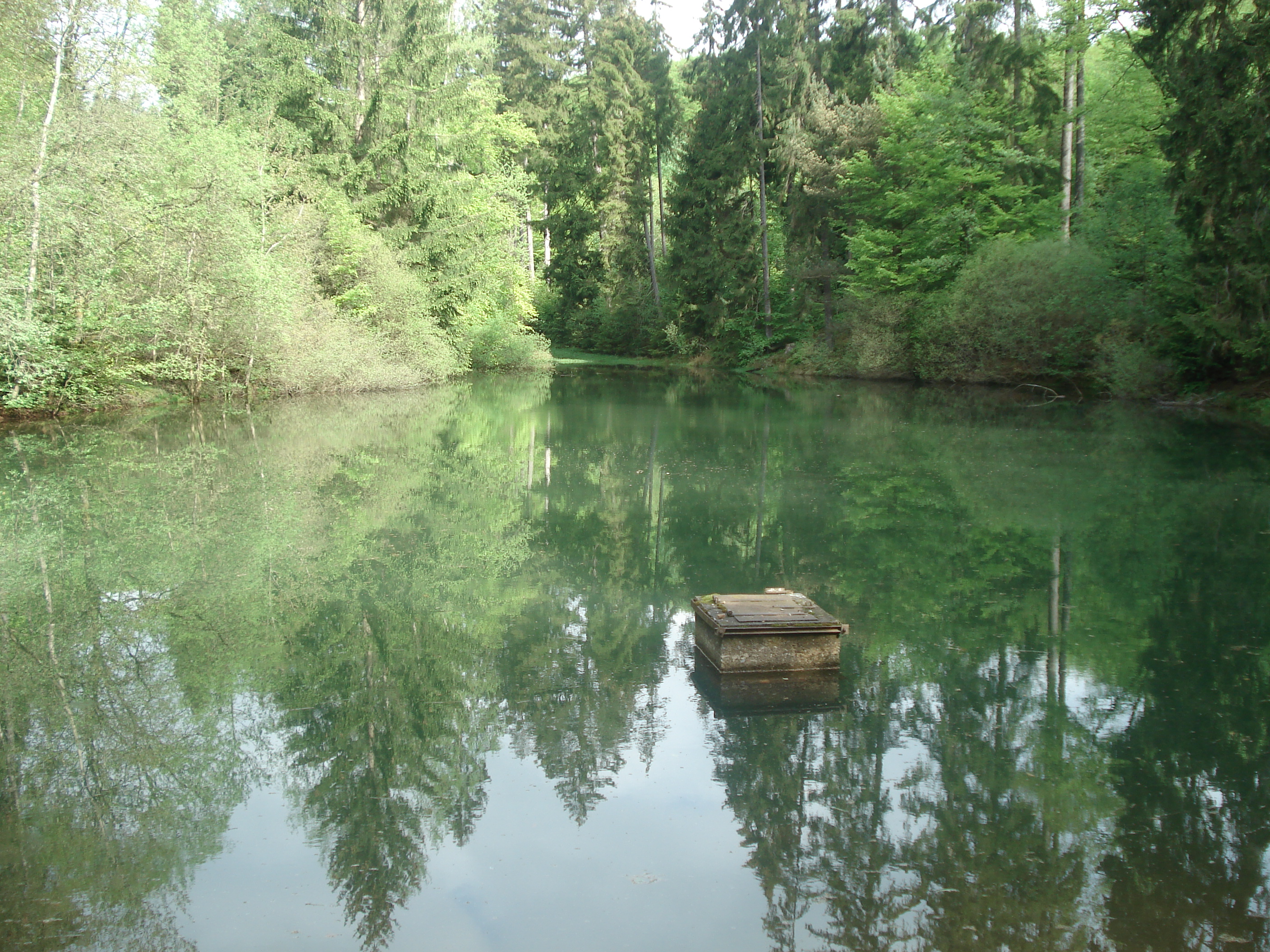 Der Breitsee, die Quelle des Breitbachs, südwestlich von Rothenbuch